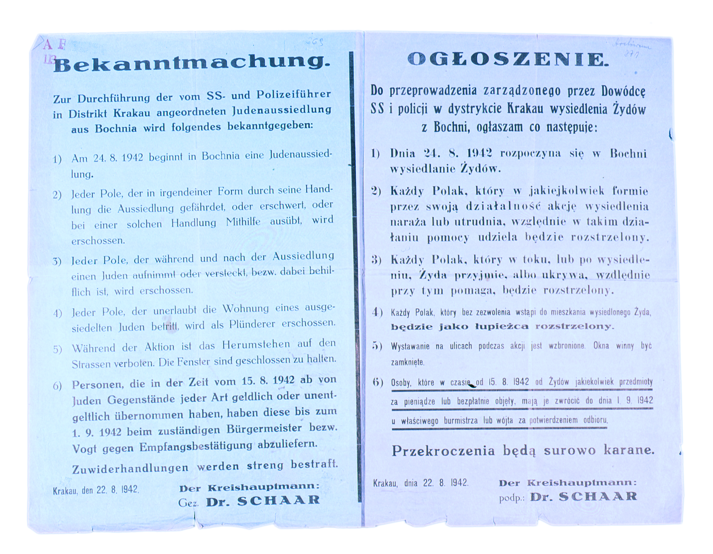 Plakat